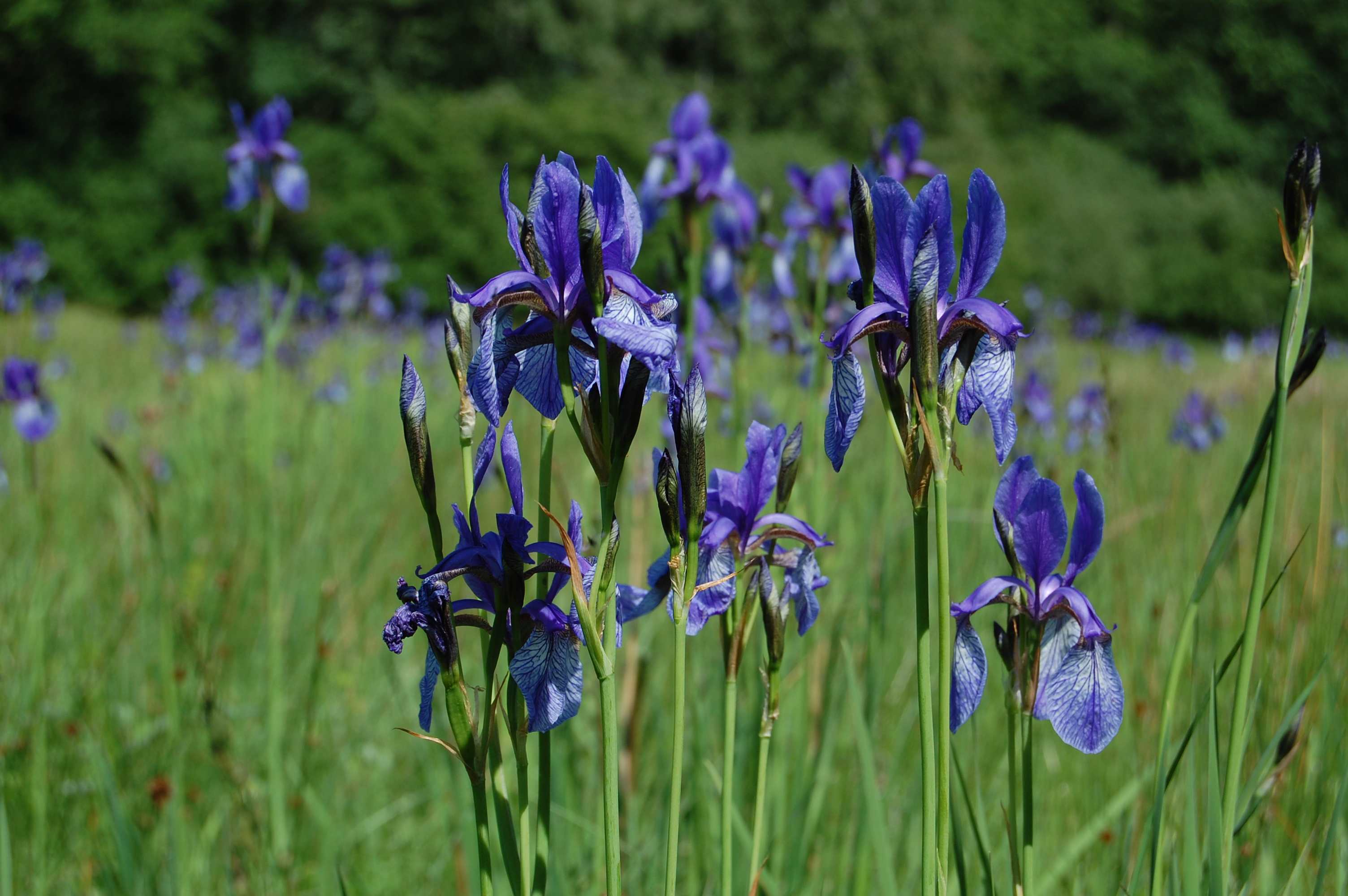 Iris sibirica , Wildbestand im Bockmerholz bei Hannover